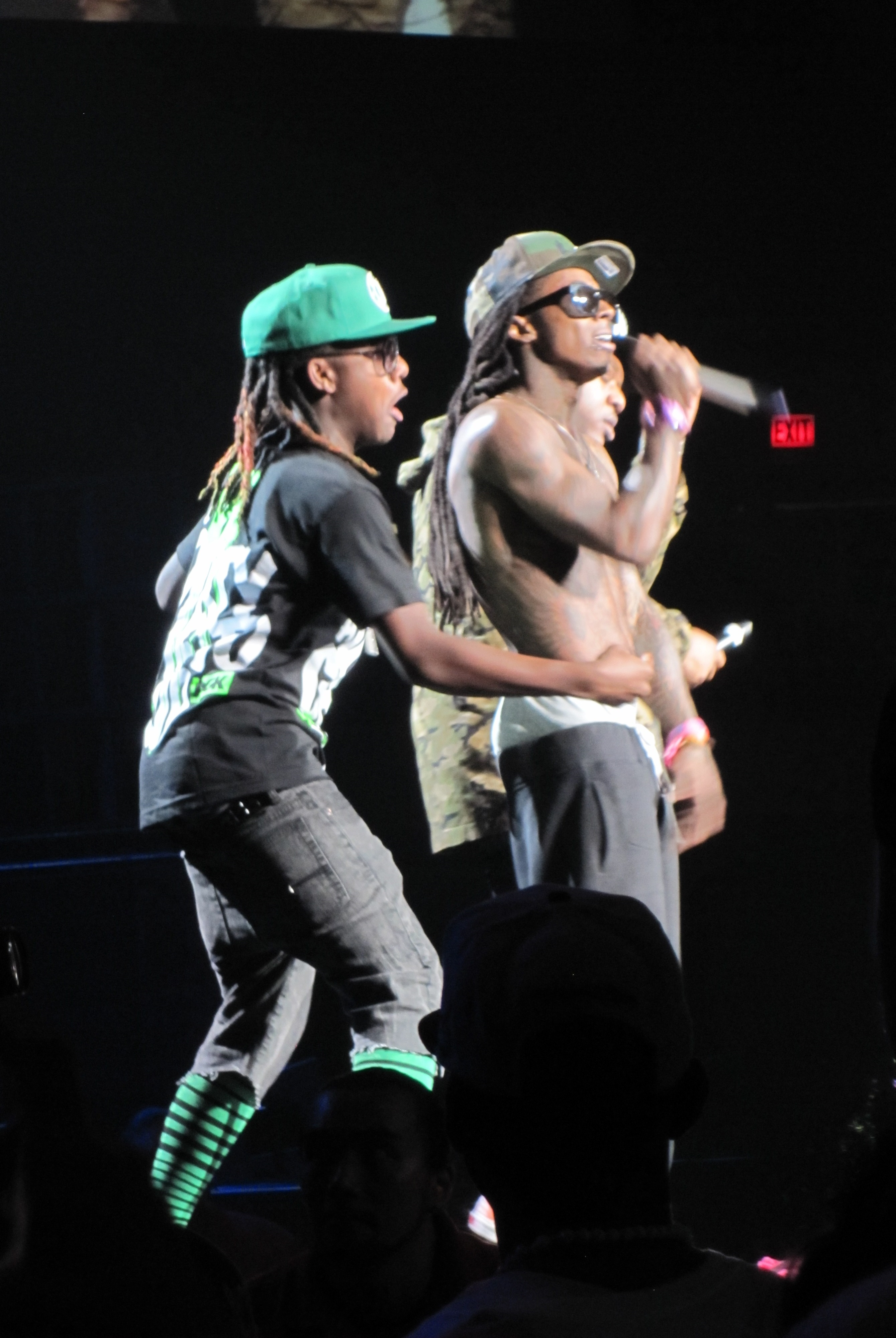 2011年7月16日 ニールブレイデル・アリーナ